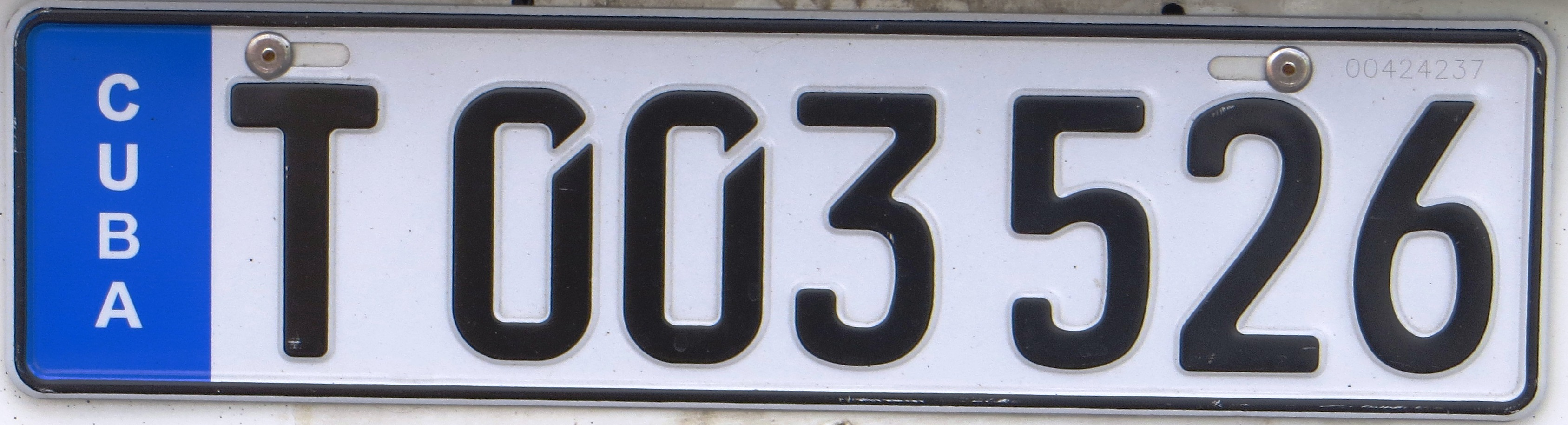 Kentekenplaat van Cuba